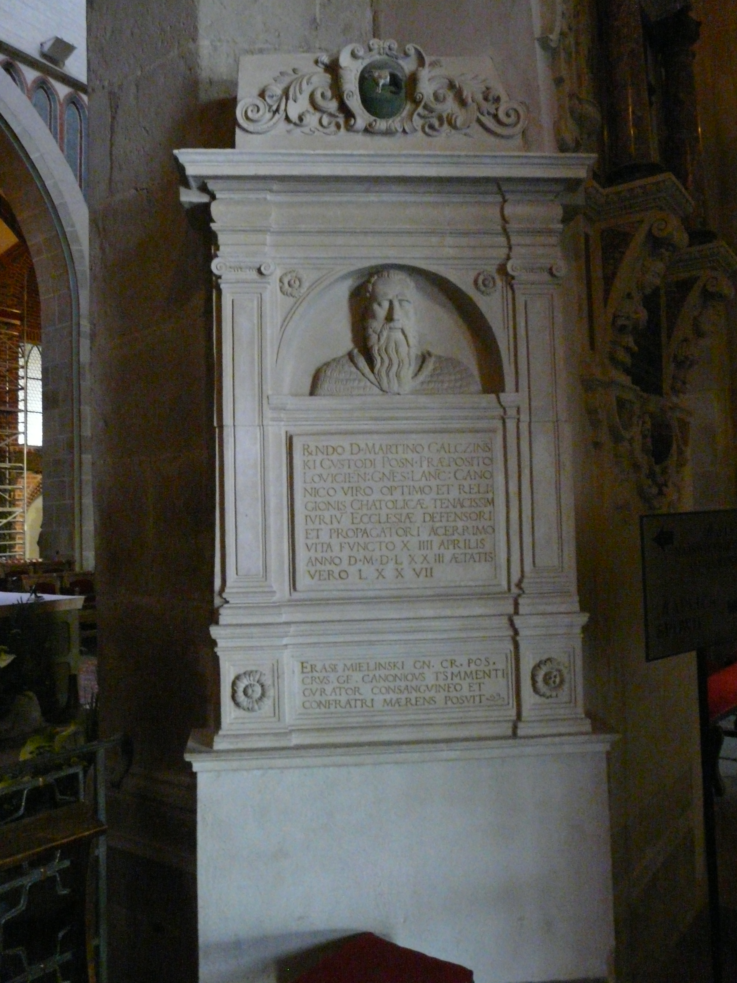 Gniezno, Poland